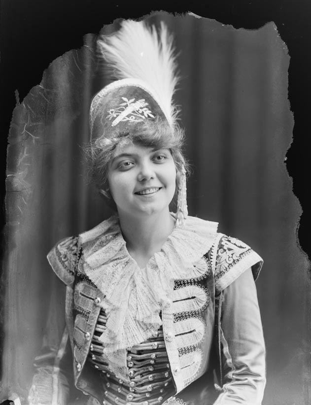 Retrat de mig cos de la soprano Conxita Supervia vestida amb una jaqueta de militar i un barret bicorn.